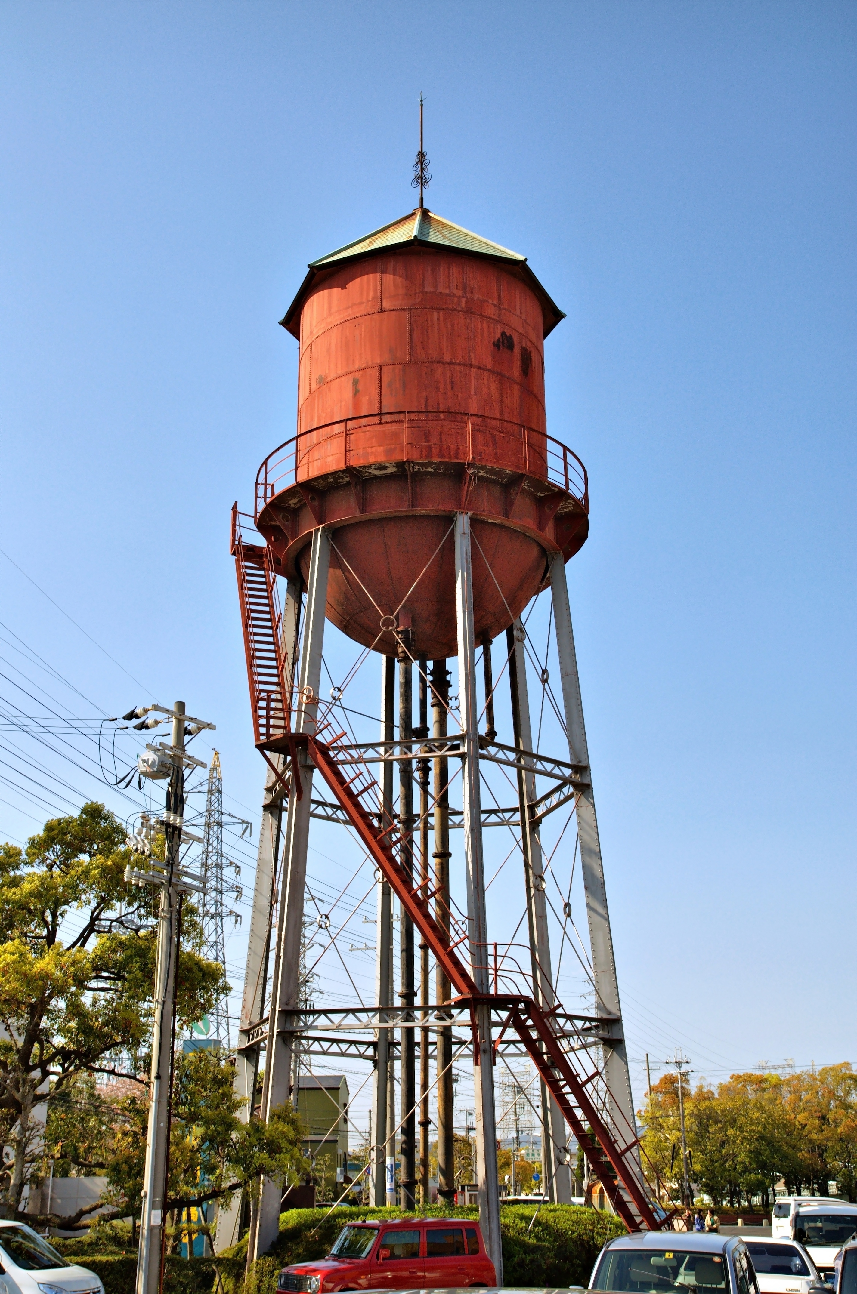 高砂市旧朝日町浄水場配水塔